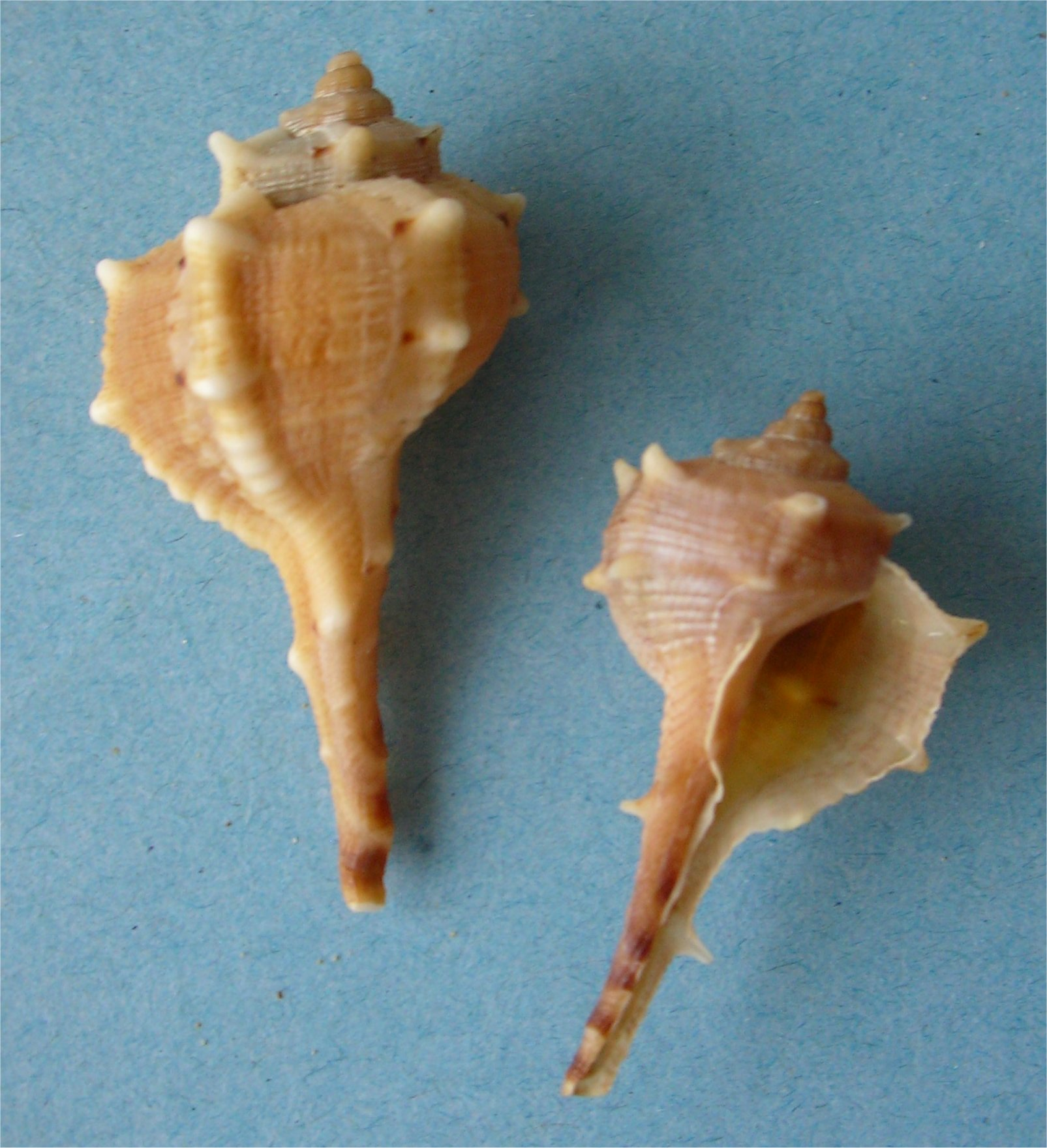 Haustellum brandaris, loc. Torregaveta, Bacoli (NA) Italy